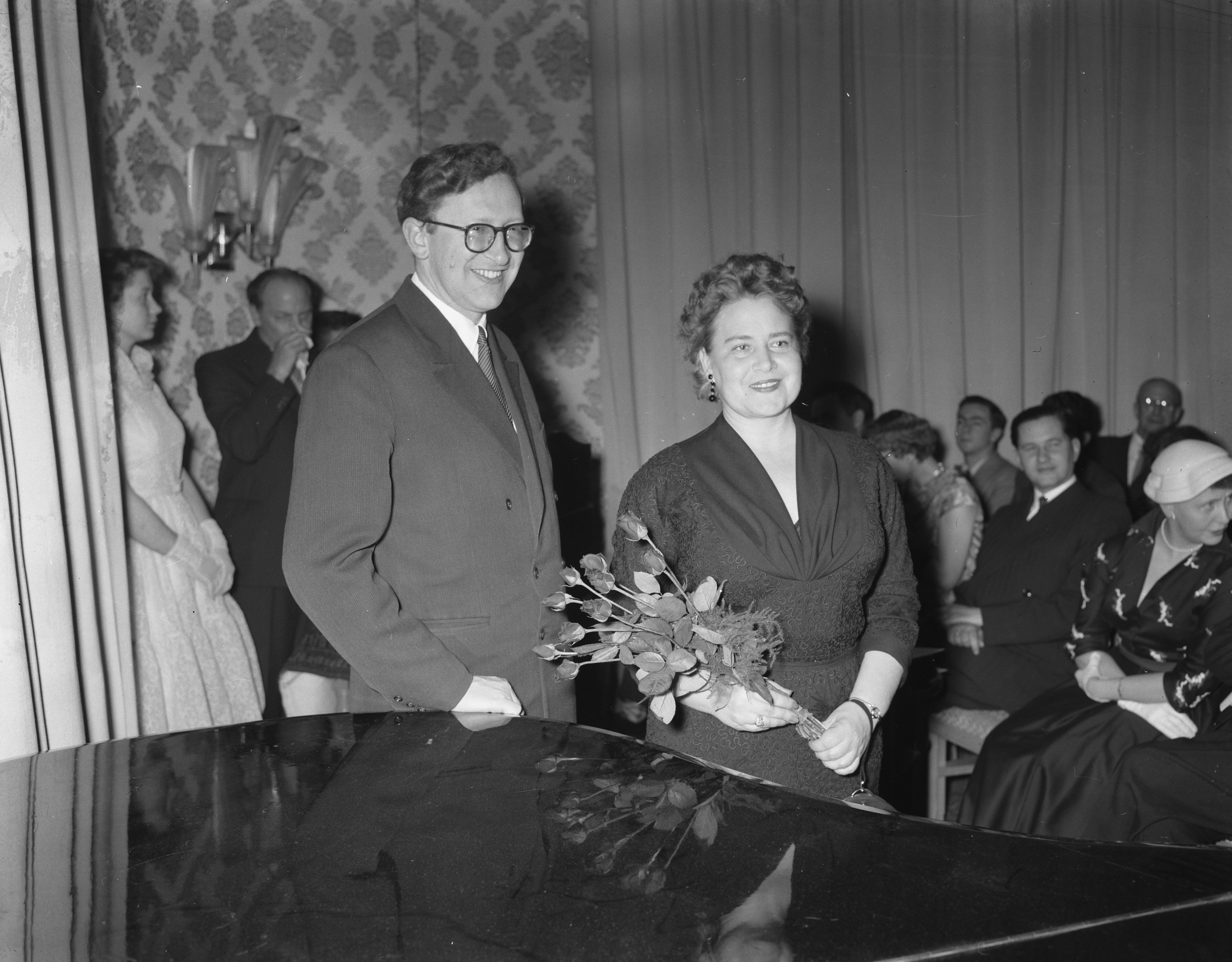 Collectie / Archief : Fotocollectie Anefo Reportage / Serie : [ onbekend ] Beschrijving : Prijsuitreiking Schaken. Kandidatentoernooi Datum : 1 mei 1956 Trefwoorden : Prijsuitreikingen, SCHAKEN Fotograaf : Noske, J.D. / Anefo Auteursrechthebbende : Nationaal Archief Materiaalsoort : Negatief (zwart/wit) Nummer archiefinventaris : bekijk toegang 2.24.01.04 Bestanddeelnummer : 907-7317